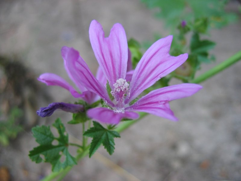 Blüte der Wilden Malve Malva sylvestris